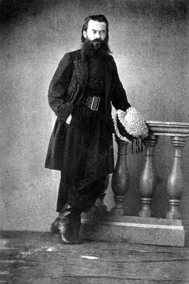 Apoollo Korzeniowski